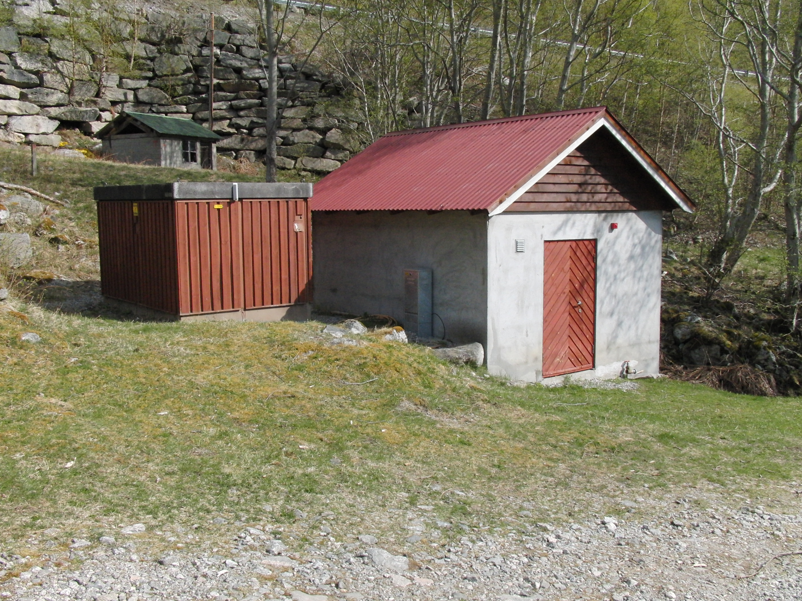 Eikedalsvatten kraftverk